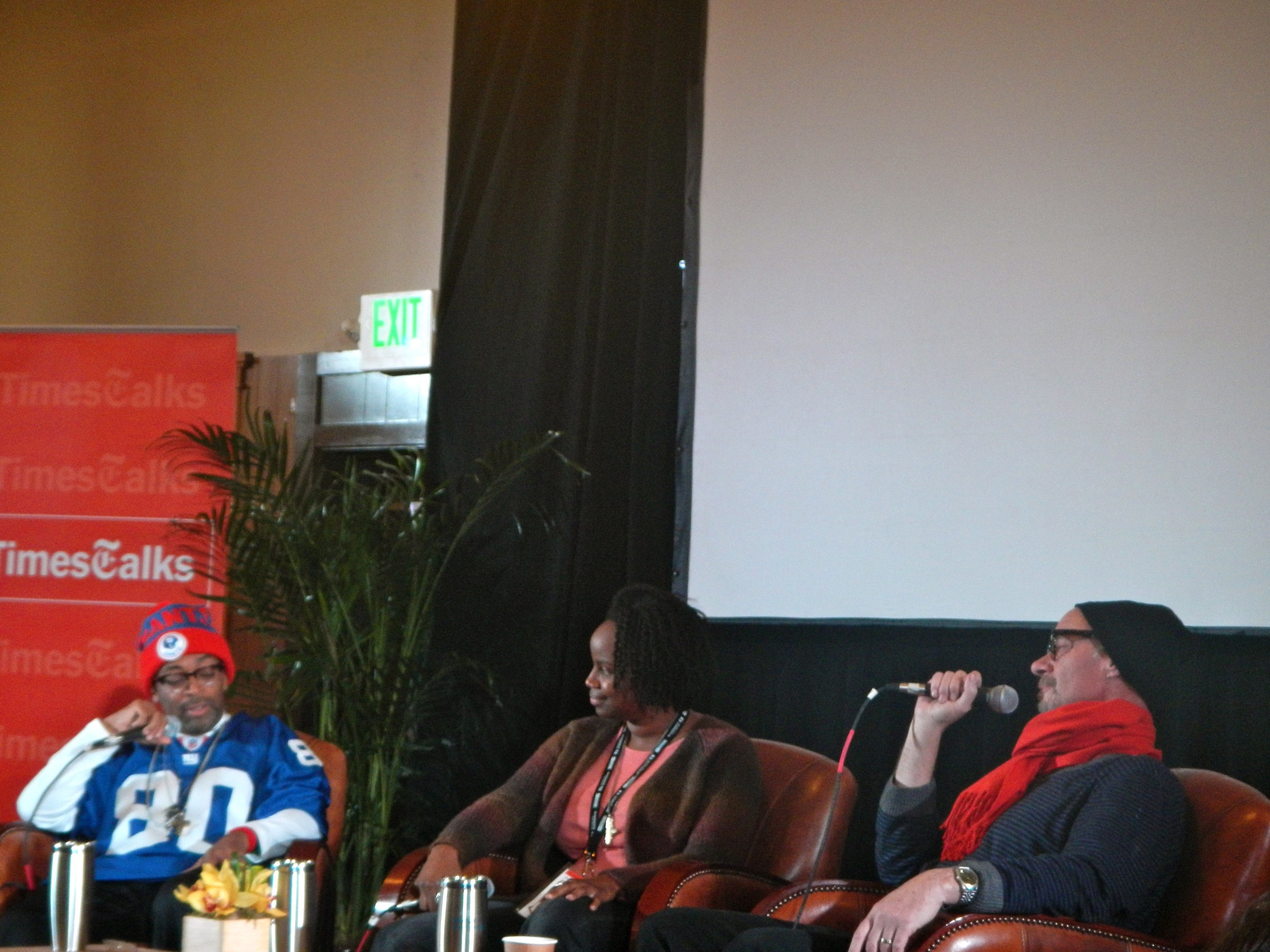 Sundance Times Talk